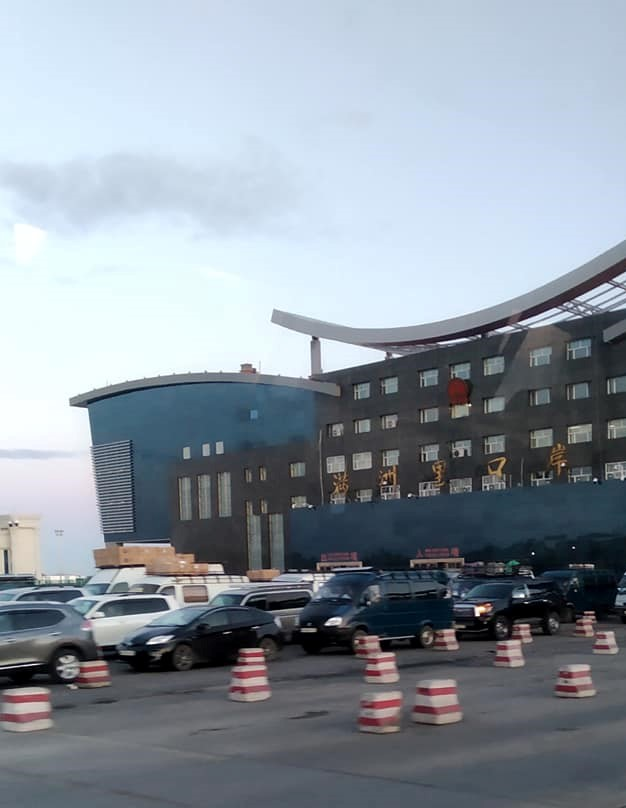 Customs building in Manchuria